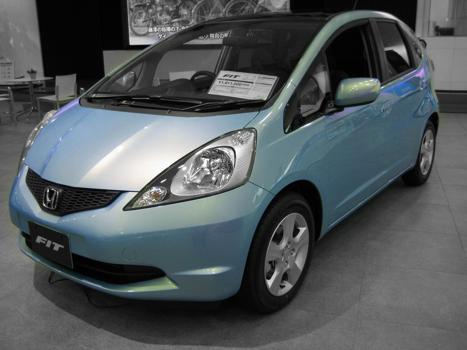 2007 Honda Fit in Honda Welcome Plaza